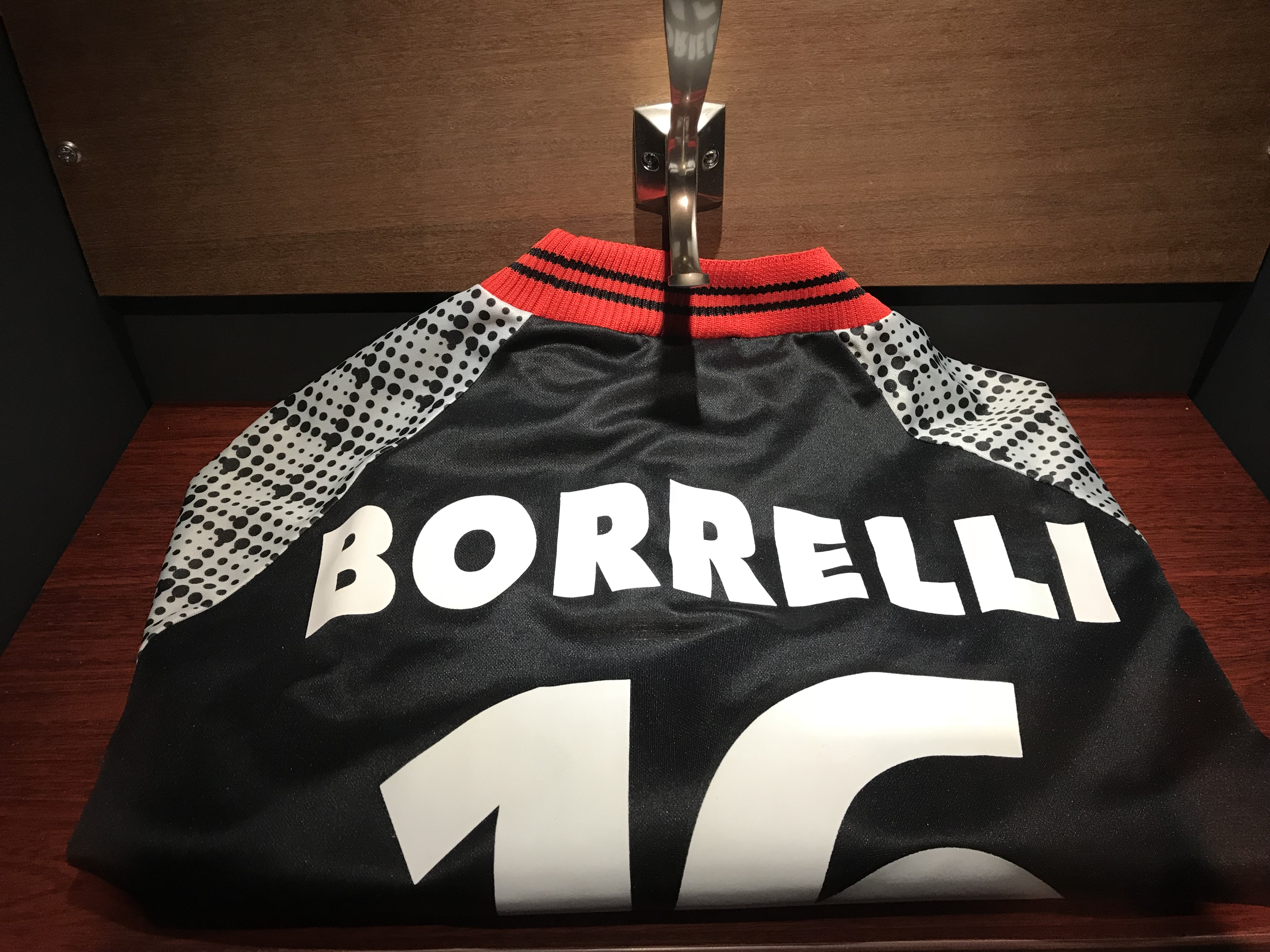 OL Le Musée au Parc OL.